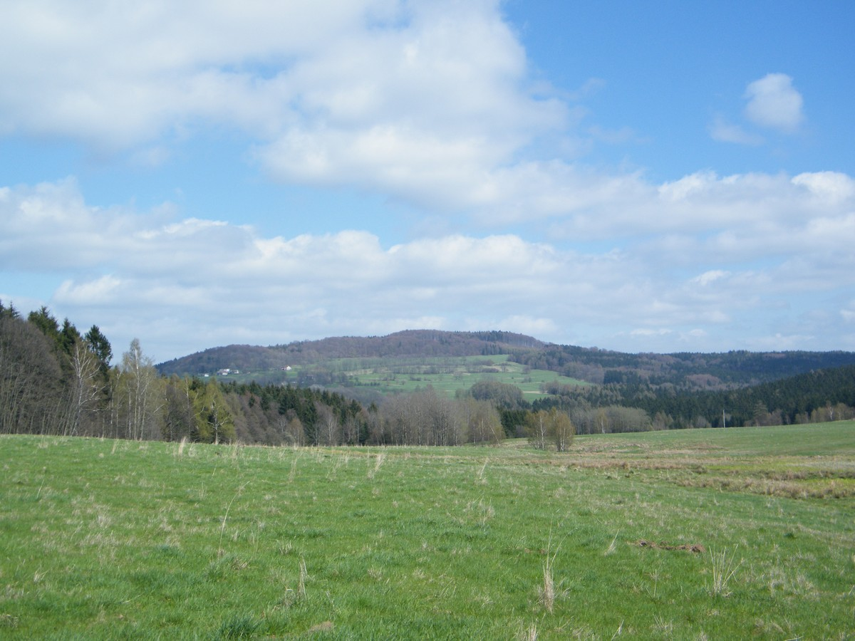 Hrazený, foceno od bývalého větrného mlýna v Mikulášovicích